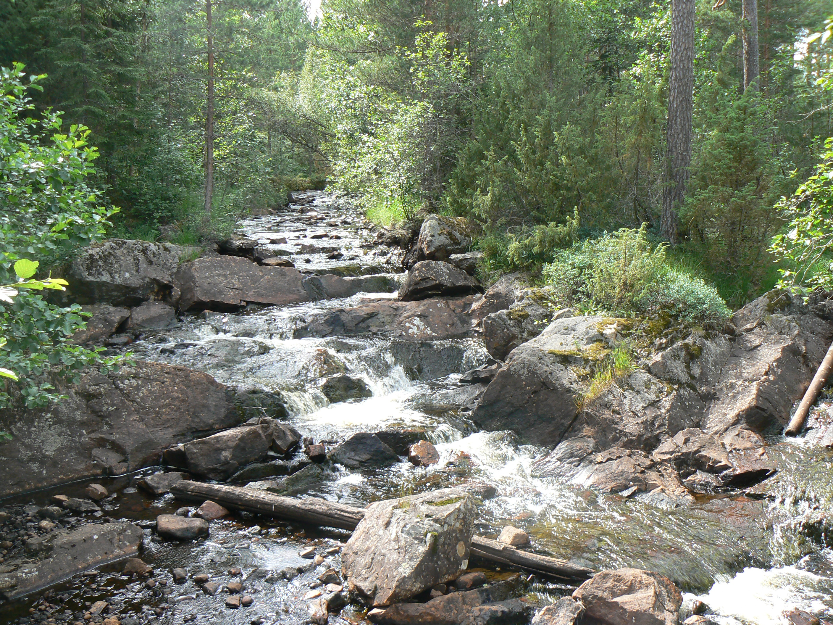 Ekorrån river in Dalarna, Sweden